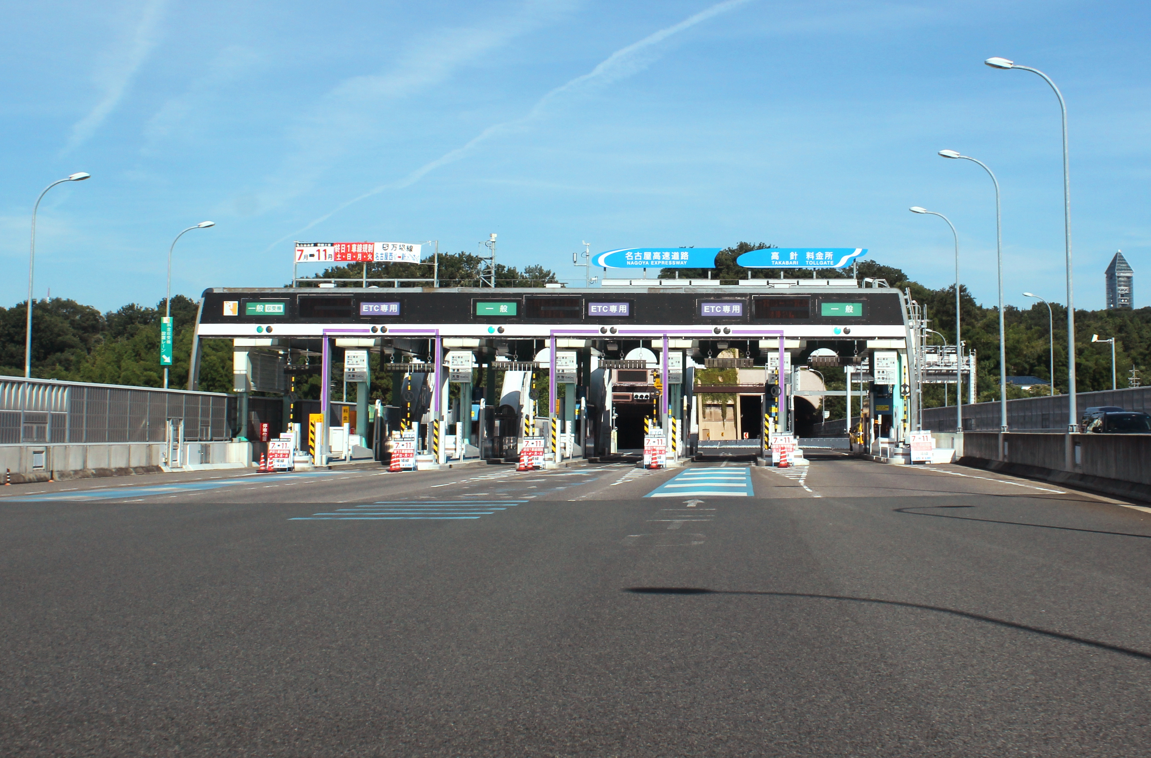 名古屋高速2号東山線 高針料金所